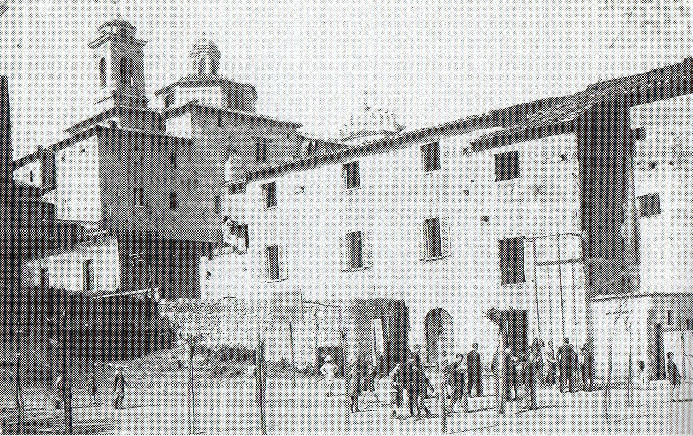 L'Oratorio San Barnaba a Marino (RM) negli anni '20